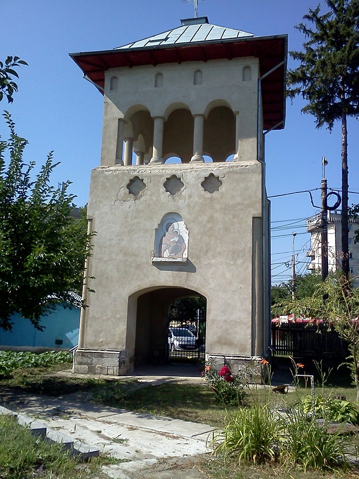 Fundațiile turnului clopotniță 03